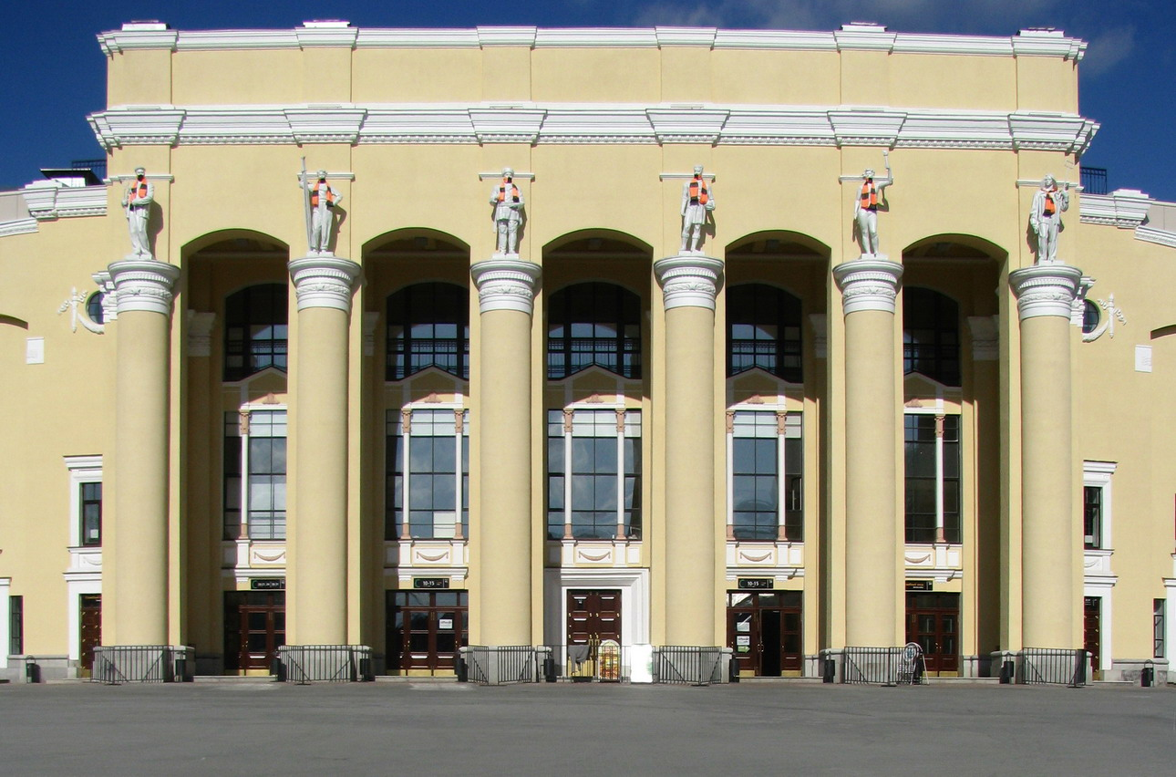 Входная группа ЦЕнтрального стадиона